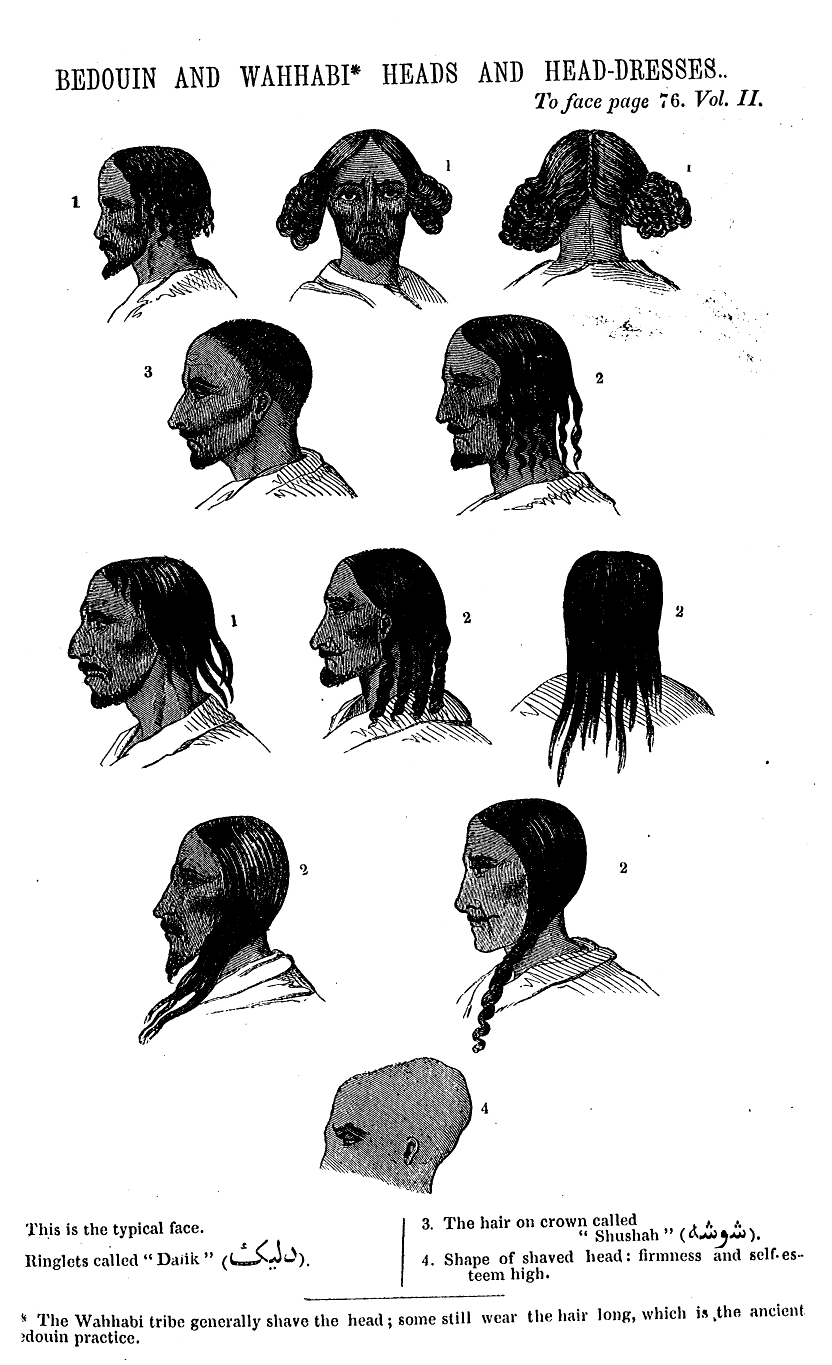 Illustration